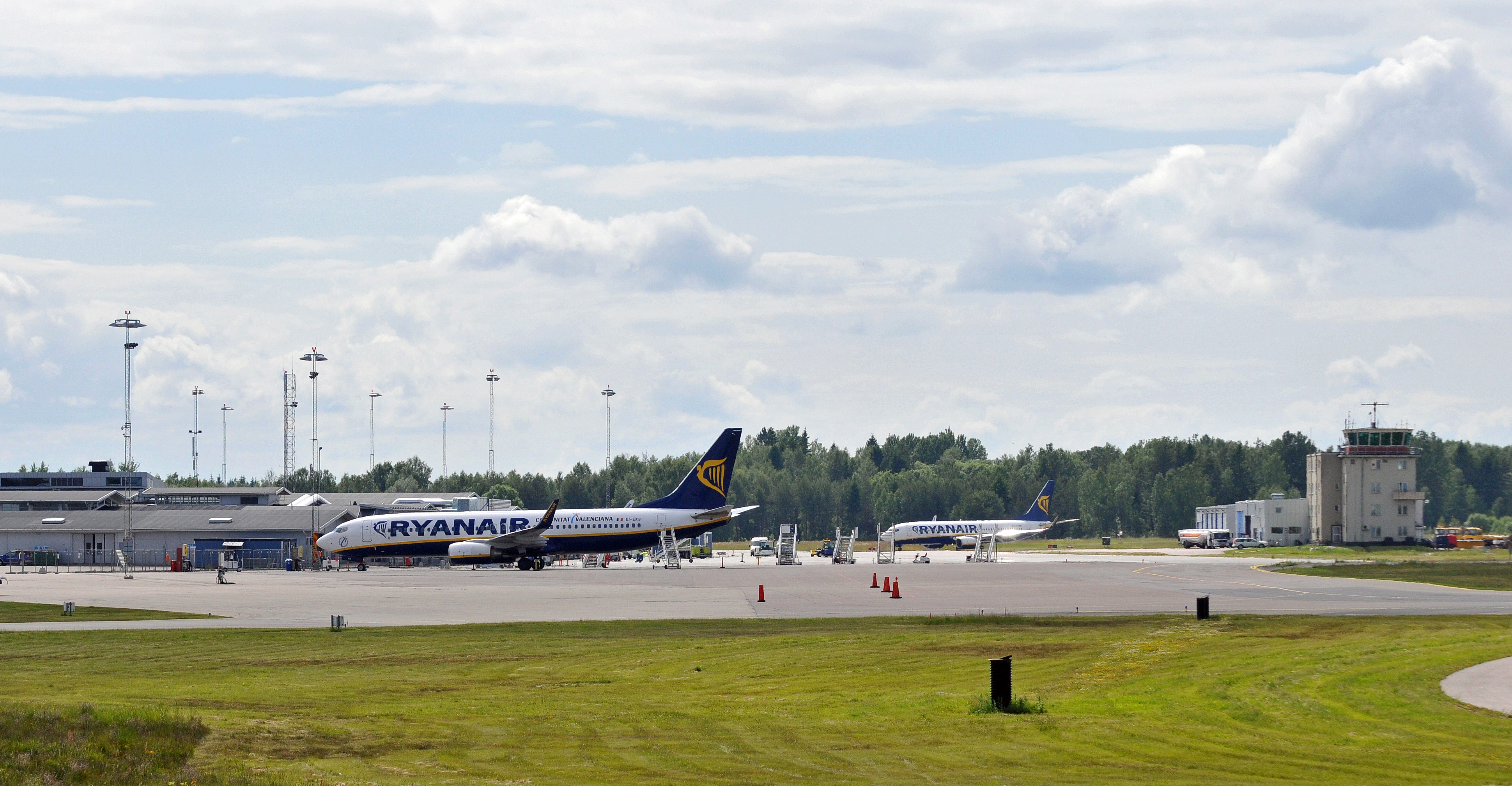 Ryanair flygplan på Stockholm-Skavsta flygplats i Nyköpings kommun